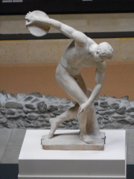 Discóbolo - Expo. Os corpos na Grécia Antiga - Fondation Gianadda - Martigny - Suíça